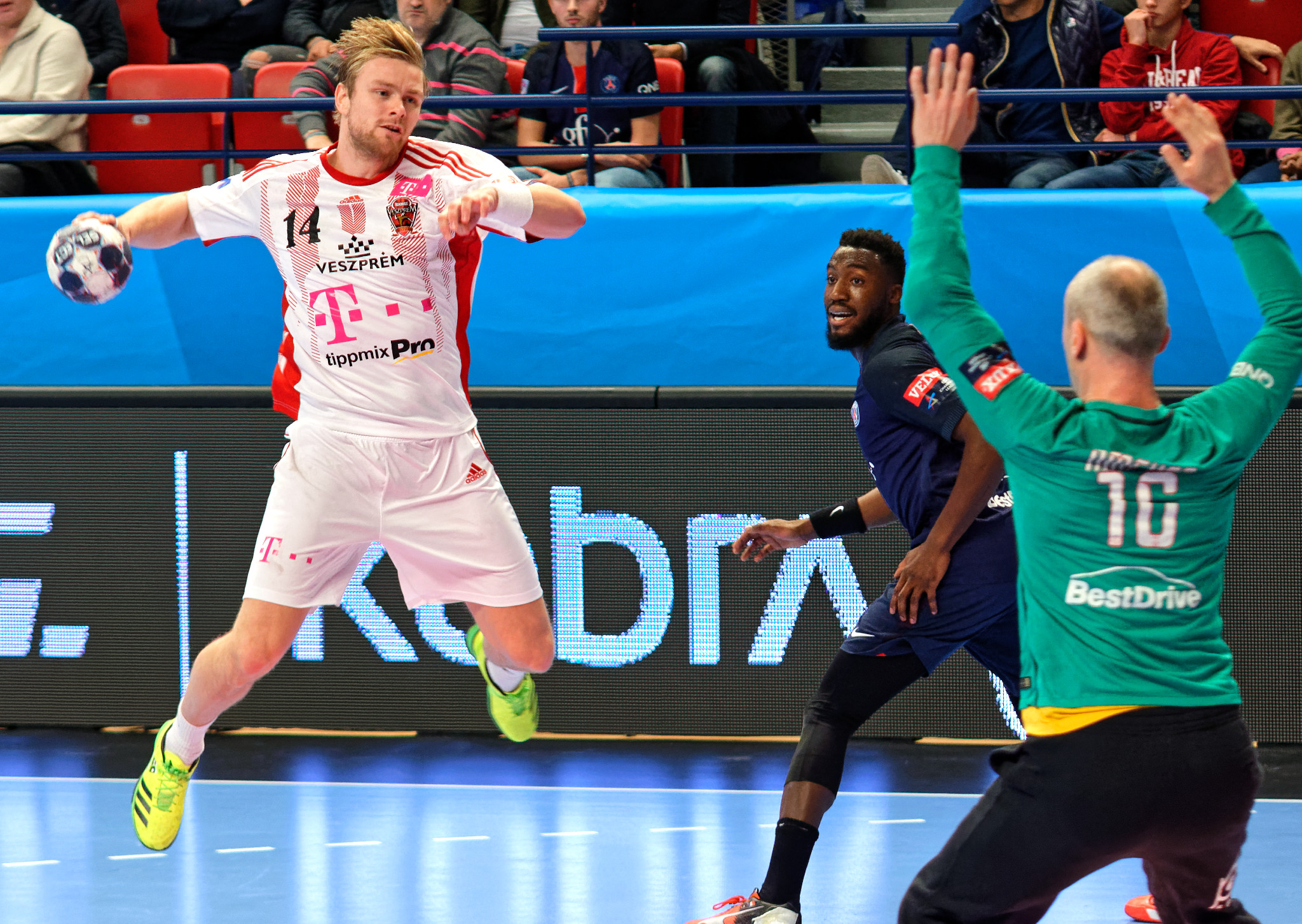 Rencontre de phase de groupe entre le PSG et Veszprem; A Coubertin, le 27 novembre 2016.